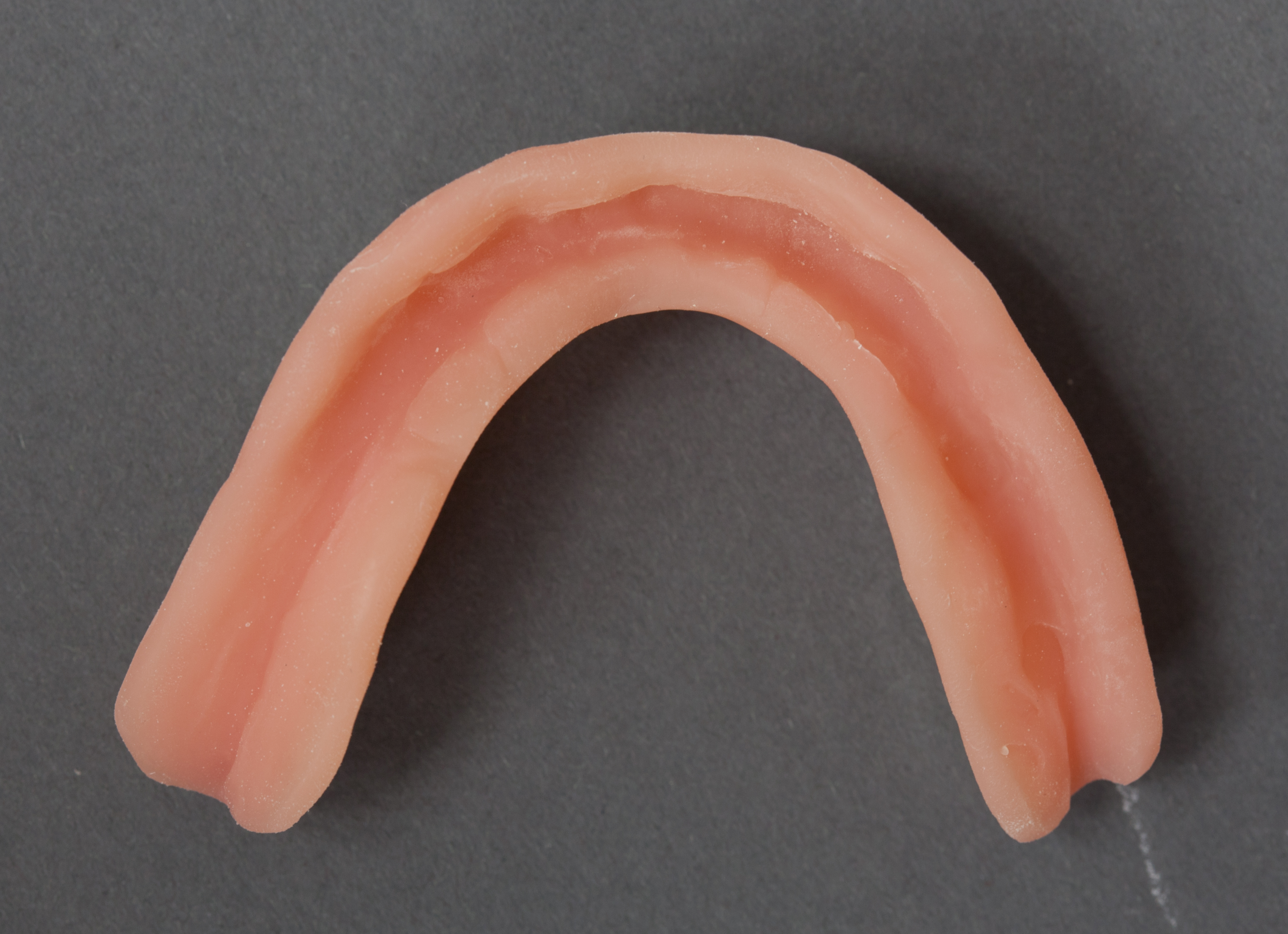 Totale Unterkieferprothese mit weichbleibender Unterfütterung